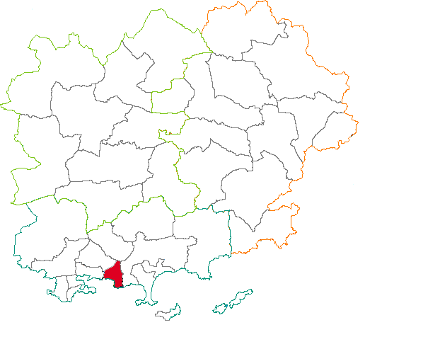 Situation du canton dans le département du Var (83) France